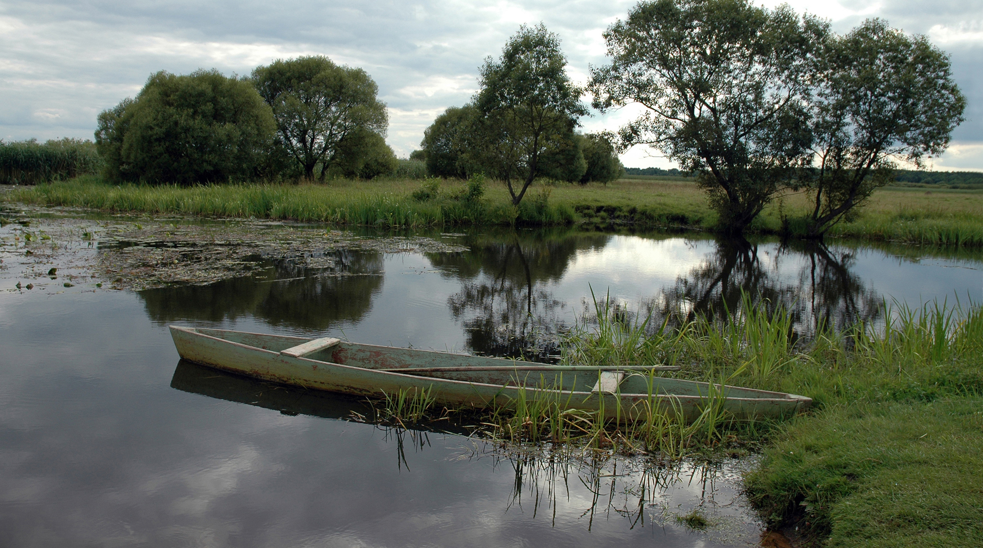 Заказник "Стохід".